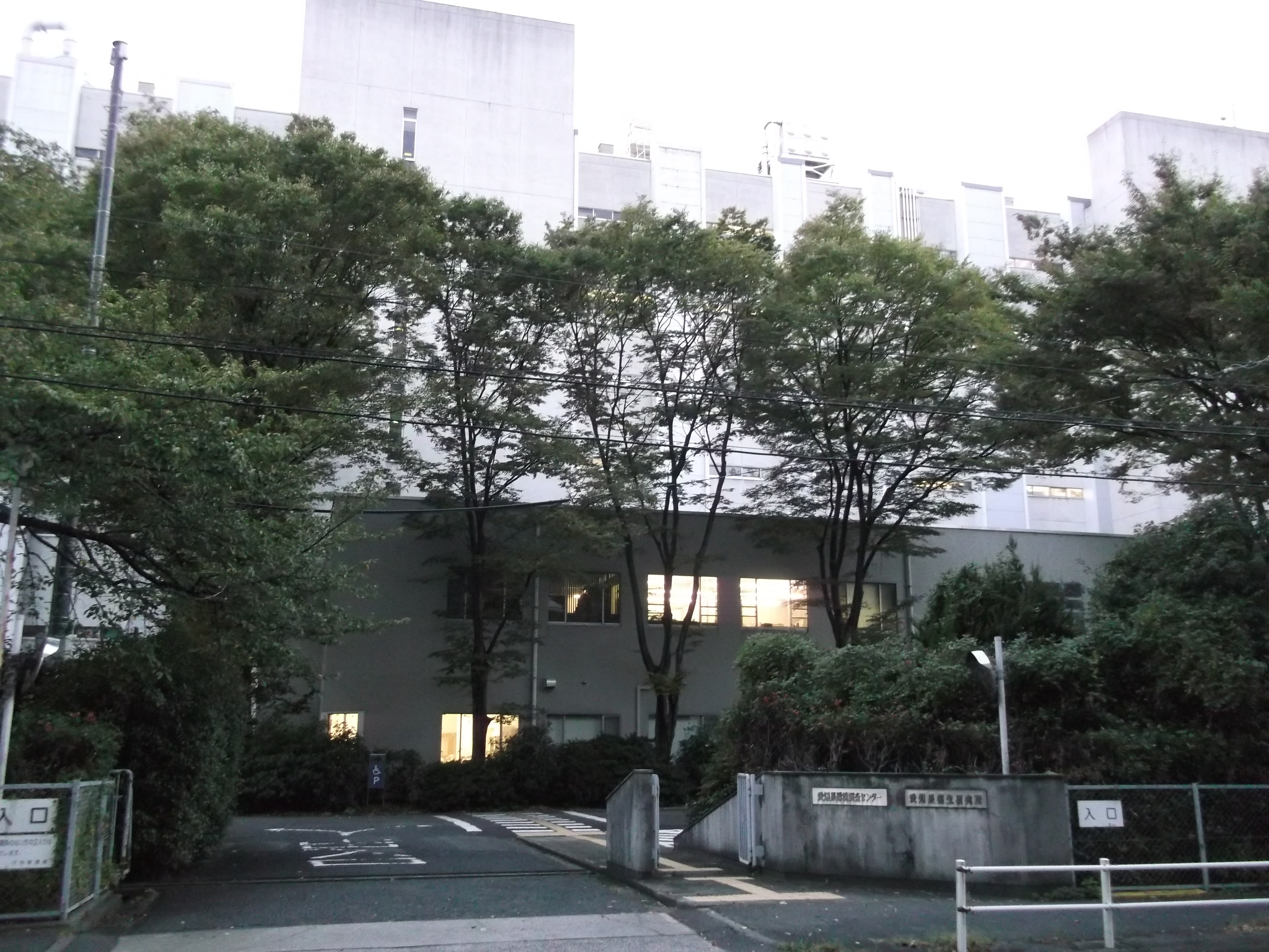 名古屋市北区辻町流の愛知県衛生研究所を北側から写す